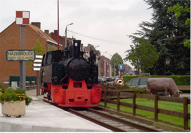 Une locomotive à vapeur des chemins de fer tchécoslovaques de la Classe U 46.0 construite à Resita en Roumanie en 1953 par Sovrom Utilaj Petrolifer, et exposée en monument devant la gare de Hazebrouck pour symboliser le riche passé ferroviaire de la ville